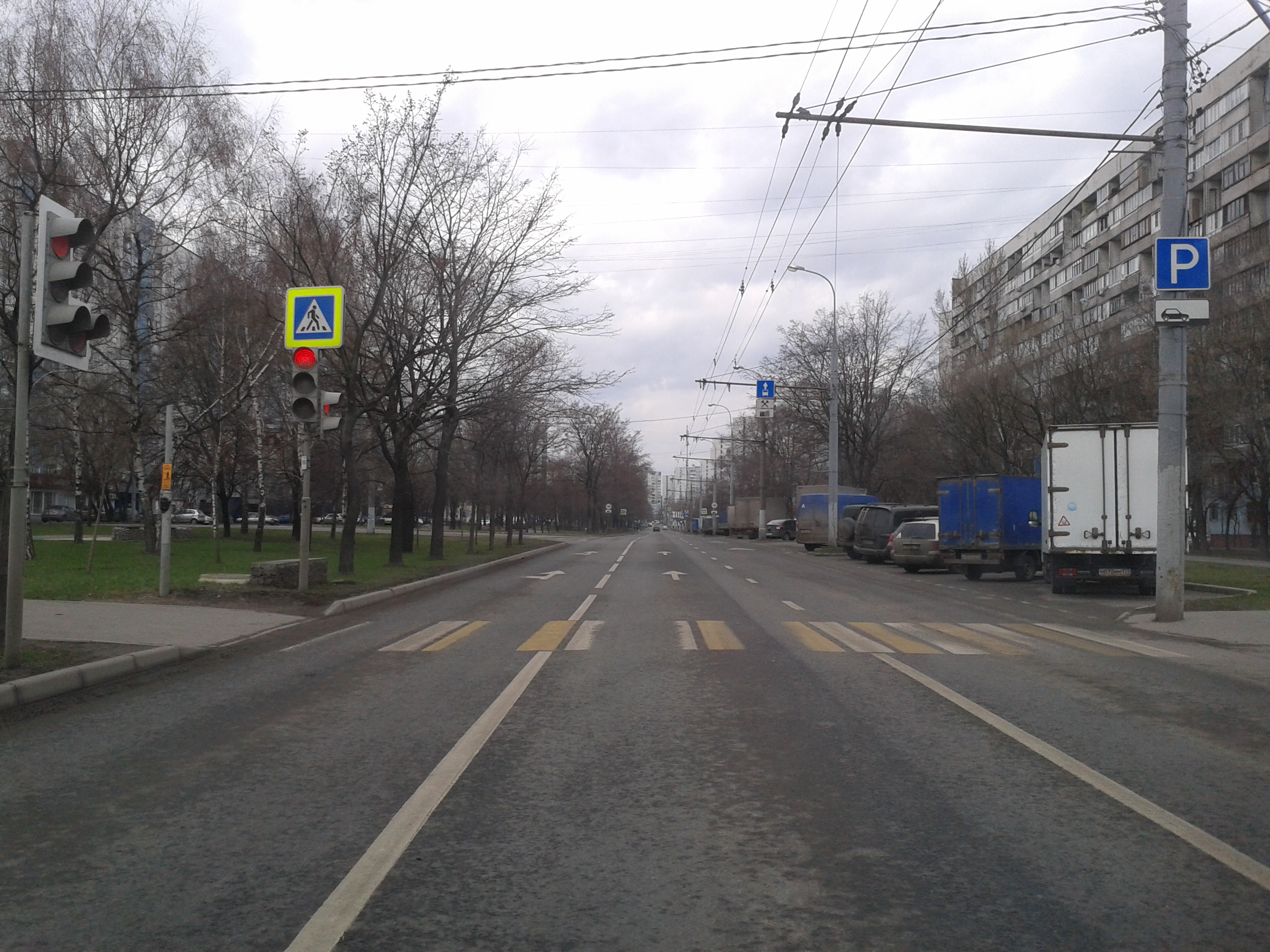 Улица Лескова, Москва, в период самоизоляции (пандемия коронавируса), 3 апреля 2020